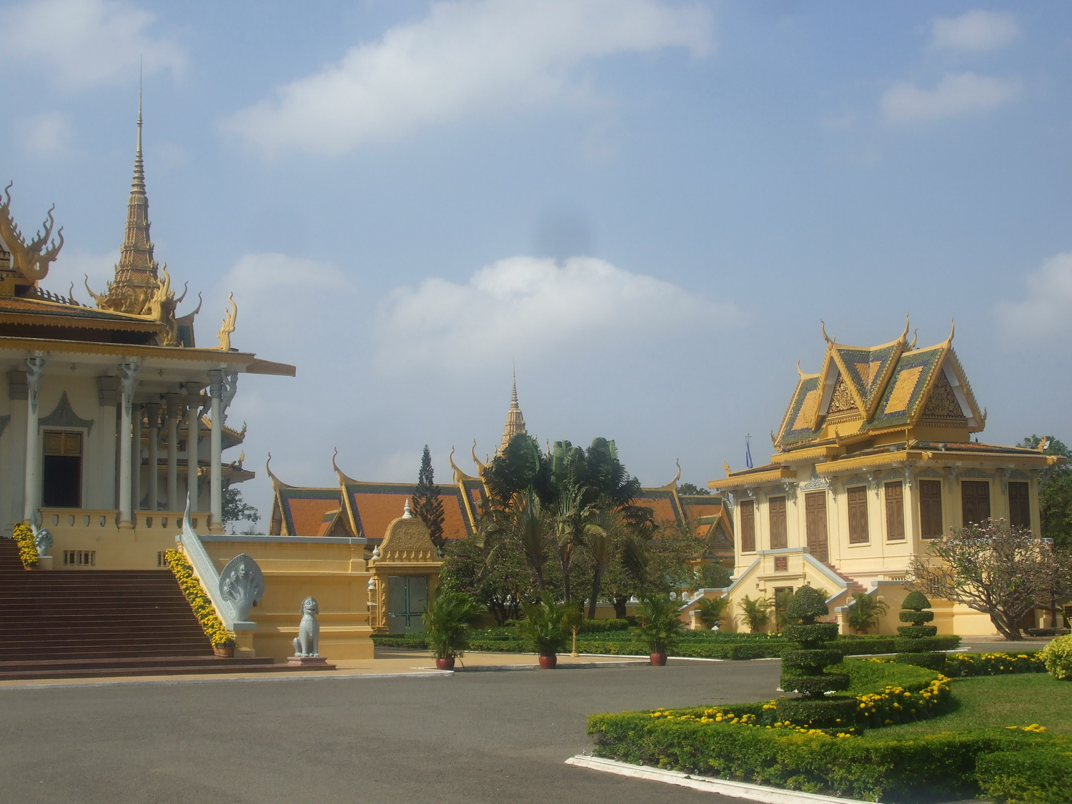 Một phần trong hoàng cung Vương quốc Chân Lạp (nay là Vương quốc Campuchia)